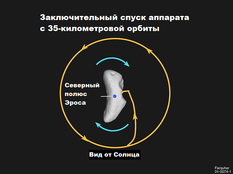 Переведена и исправлена